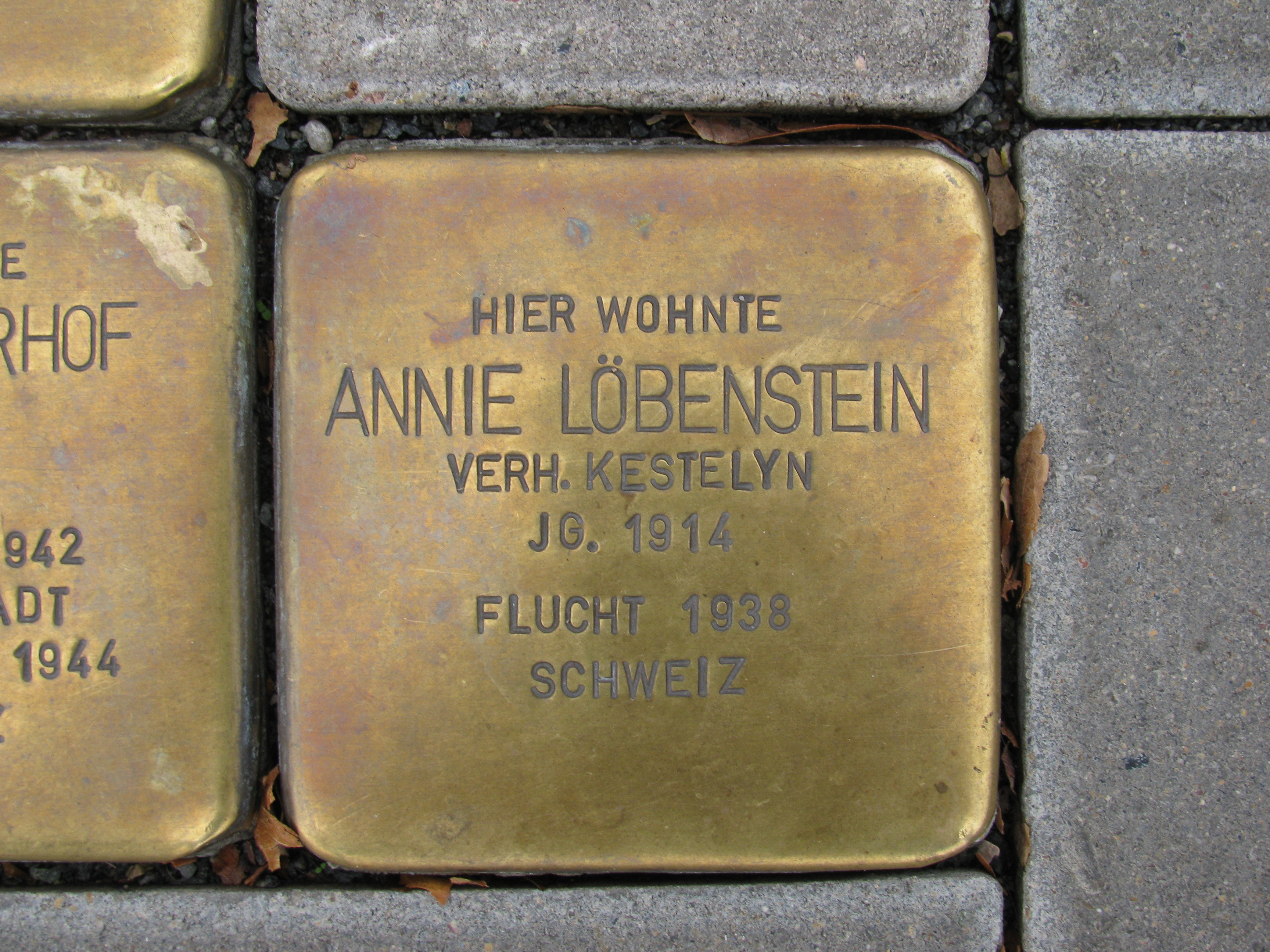 der Stolperstein für Annie Löbenstein vor dem Haus Zingel 18 in Hildesheim